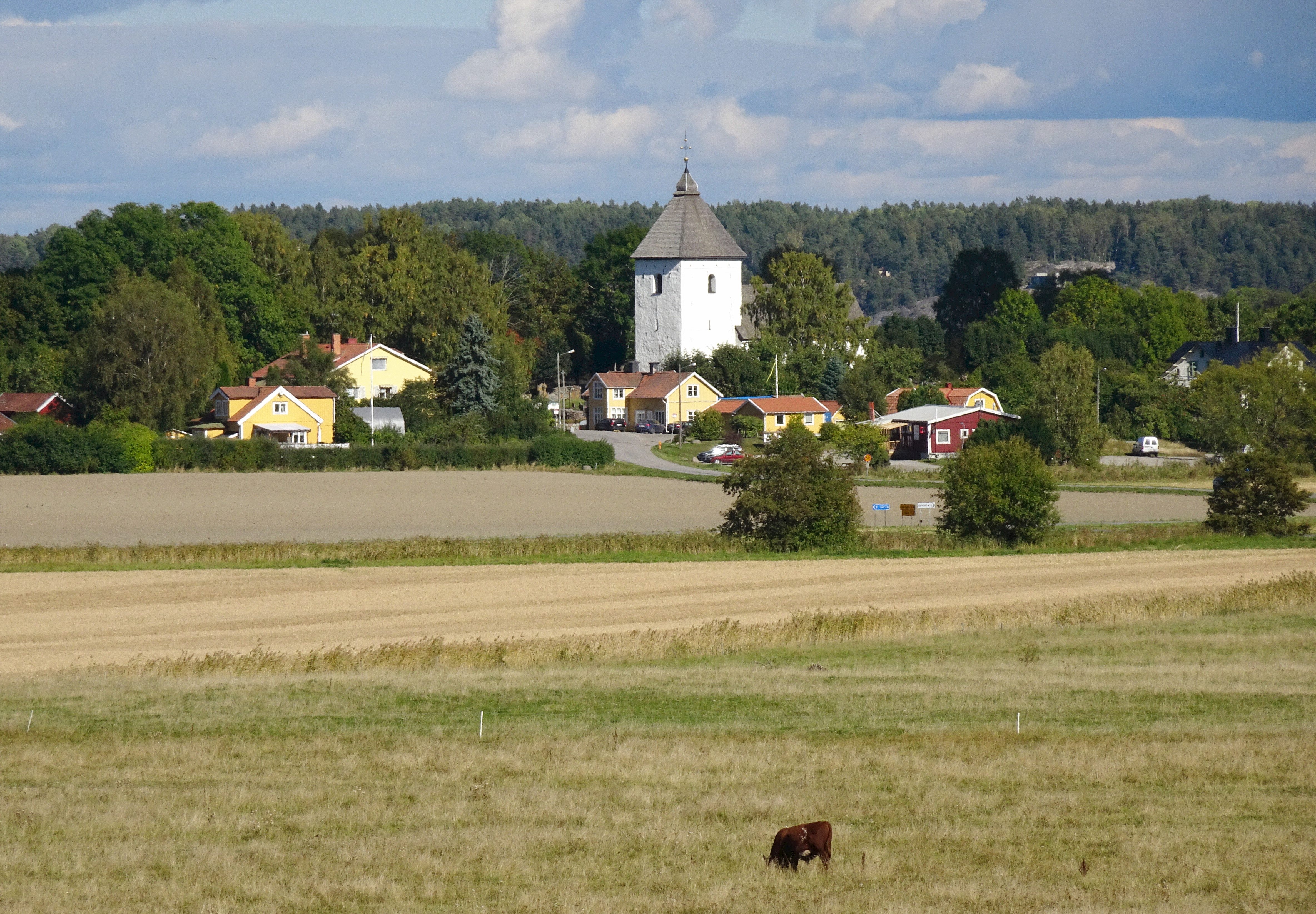 Adelsö kyrka, vy från sydväst